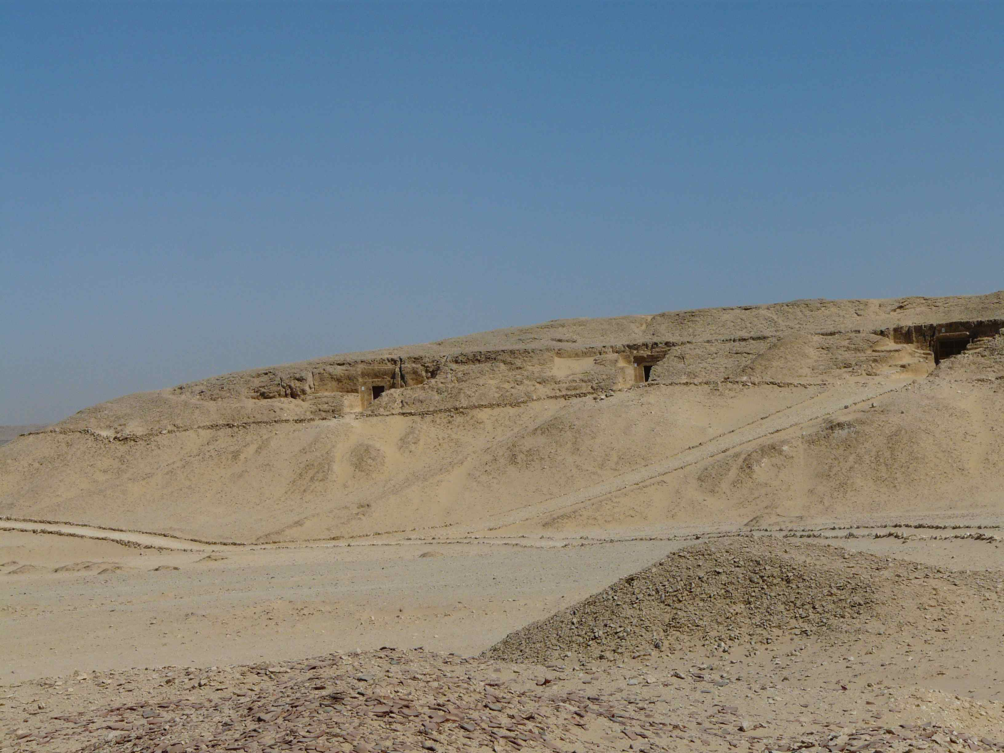 Amarna - Accès aux tombes sud